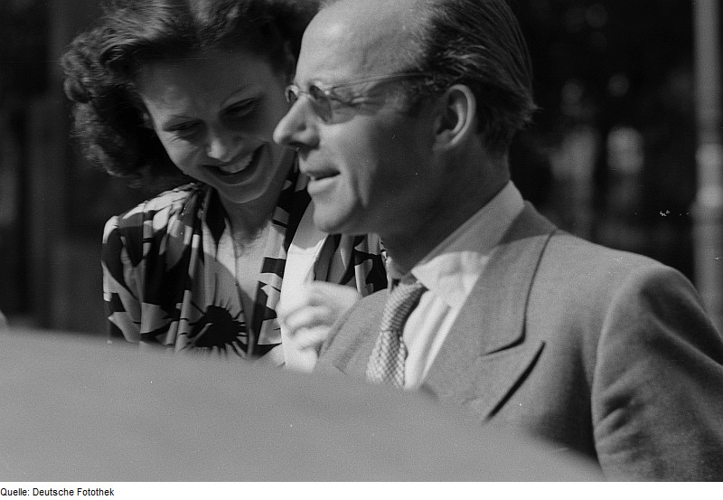 Original image description from the Deutsche Fotothek Hertha Feiler und Heinz Rühmann